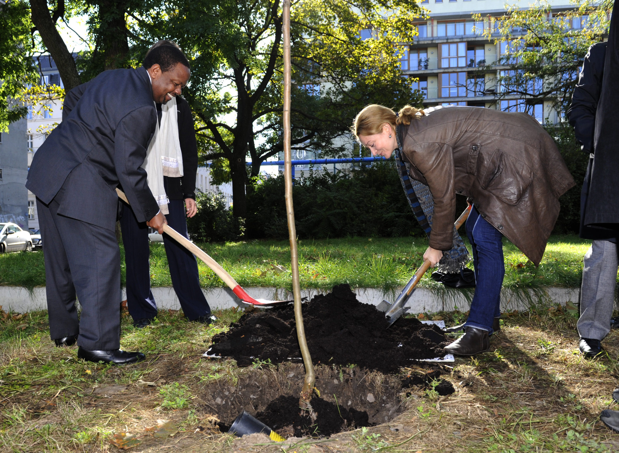 H.E. Ken Nyauncho Osinde (Botschafter der Republik Kenia), Annette Maennel (Heinrich Böll Stiftung) Foto: Stephan Röhl Ehrung: Baum für Wangari Maathai Zum Gedenken an Prof. Wangari Maathai, Afrikas bekannteste grüne Politikerin und Friedensnobelpreisträgerin, hat die Heinrich-Böll-Stiftung am14. Oktober 2011 gemeinsam mit grünen Politiker/innen und dem Botschafter der Republik Kenia, H.E. Ken Nyauncho Osinde, im Garten der Berliner Geschäftstelle der Stiftung einen Apfelbaum gepflanzt. Das von Prof. Wangari Maathai ins Leben gerufene „Green Belt Movement“ hatte für diesen Tag weltweit zu einer Baumpflanzaktion zu Ehren Maathais aufgerufen. Prof. Wangari Maathai verstarb am 25. September 2011 in Nairobi.